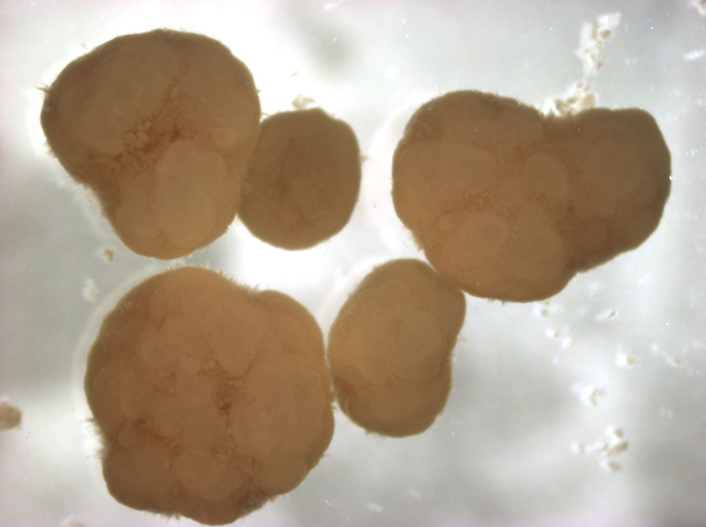 Granulos aerobios